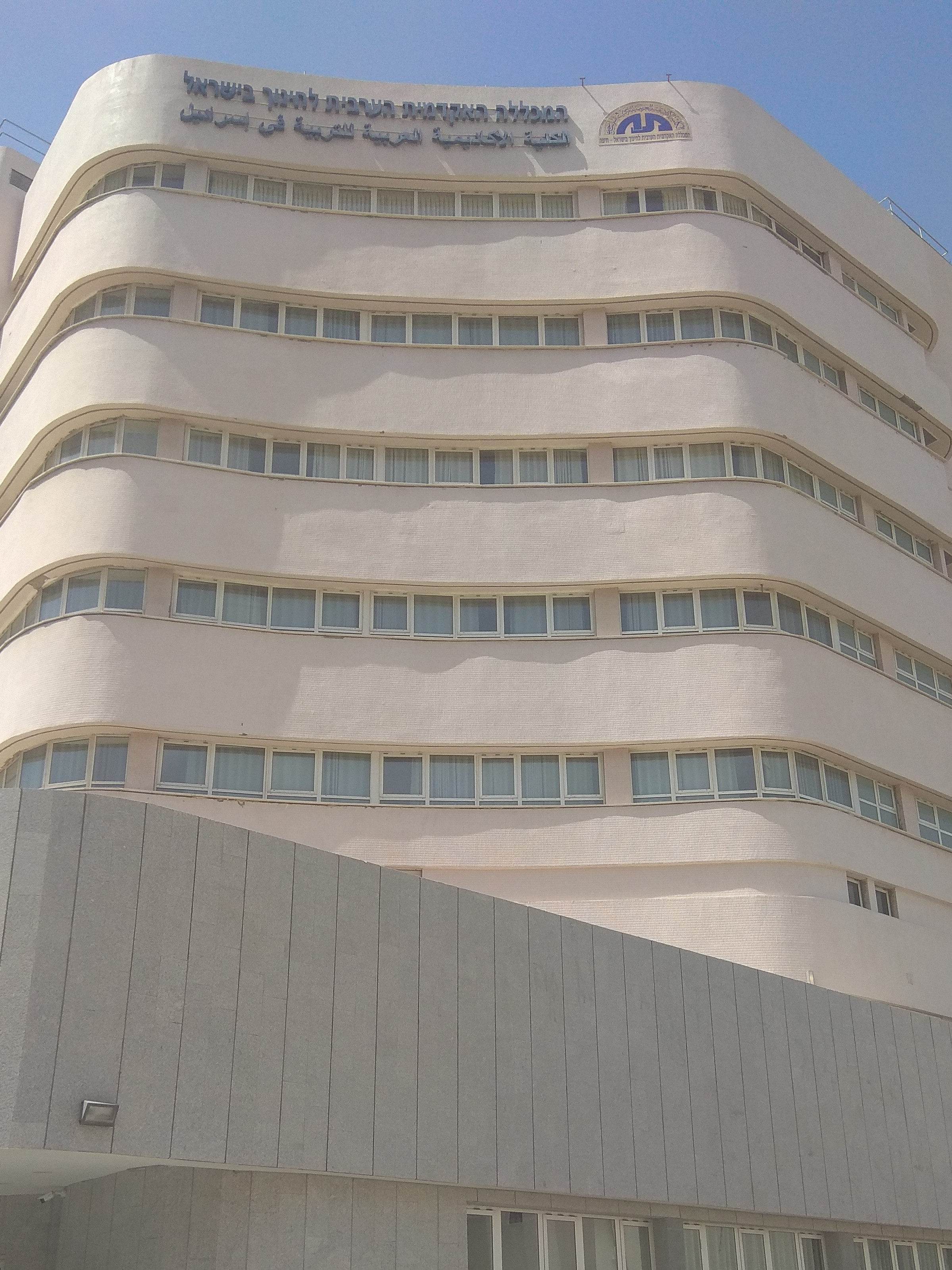 בניין המכללה האקדמית הערבית לחינוך